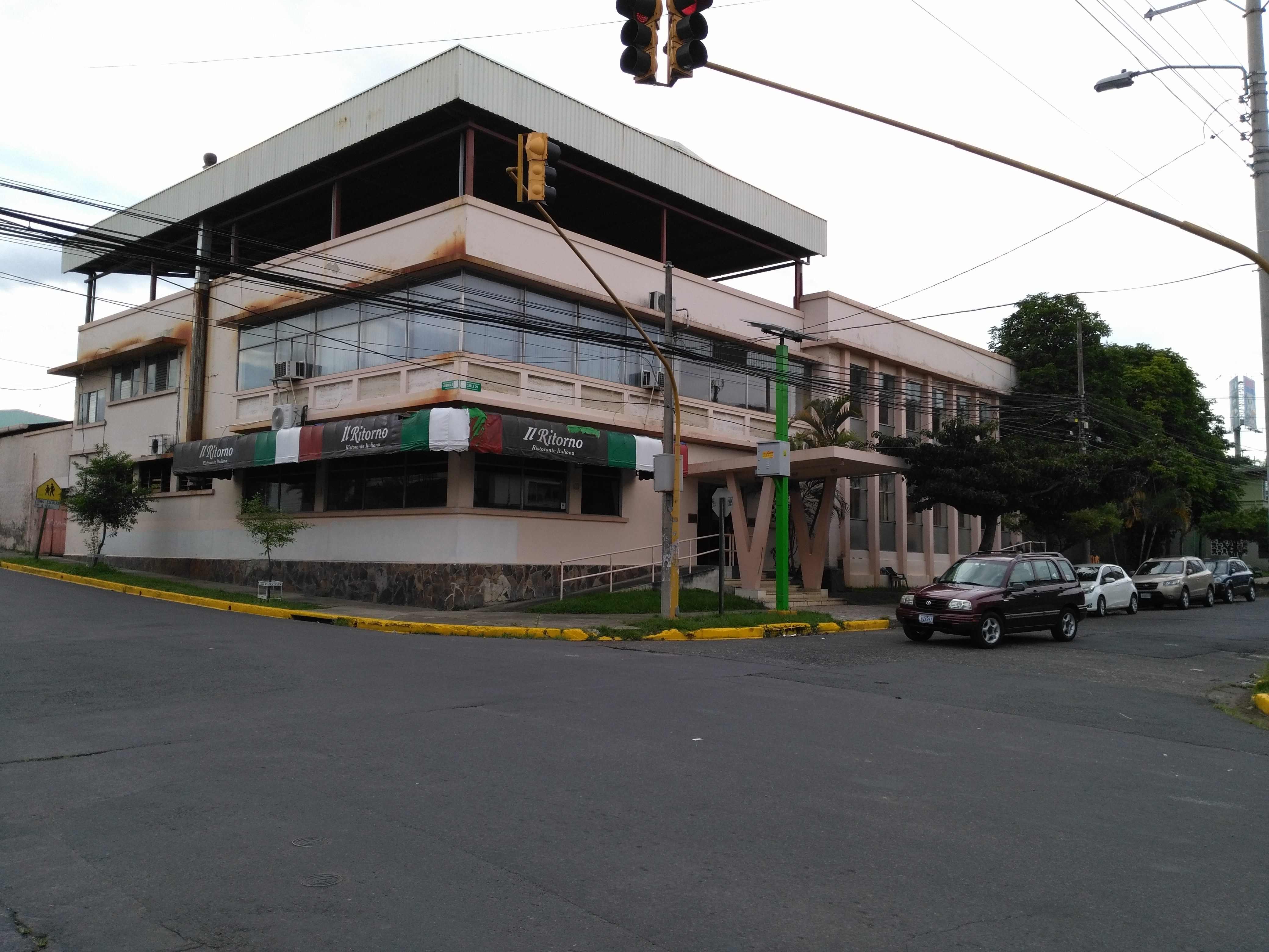 Casa Italia de la ciudad de San José, Costa Rica.